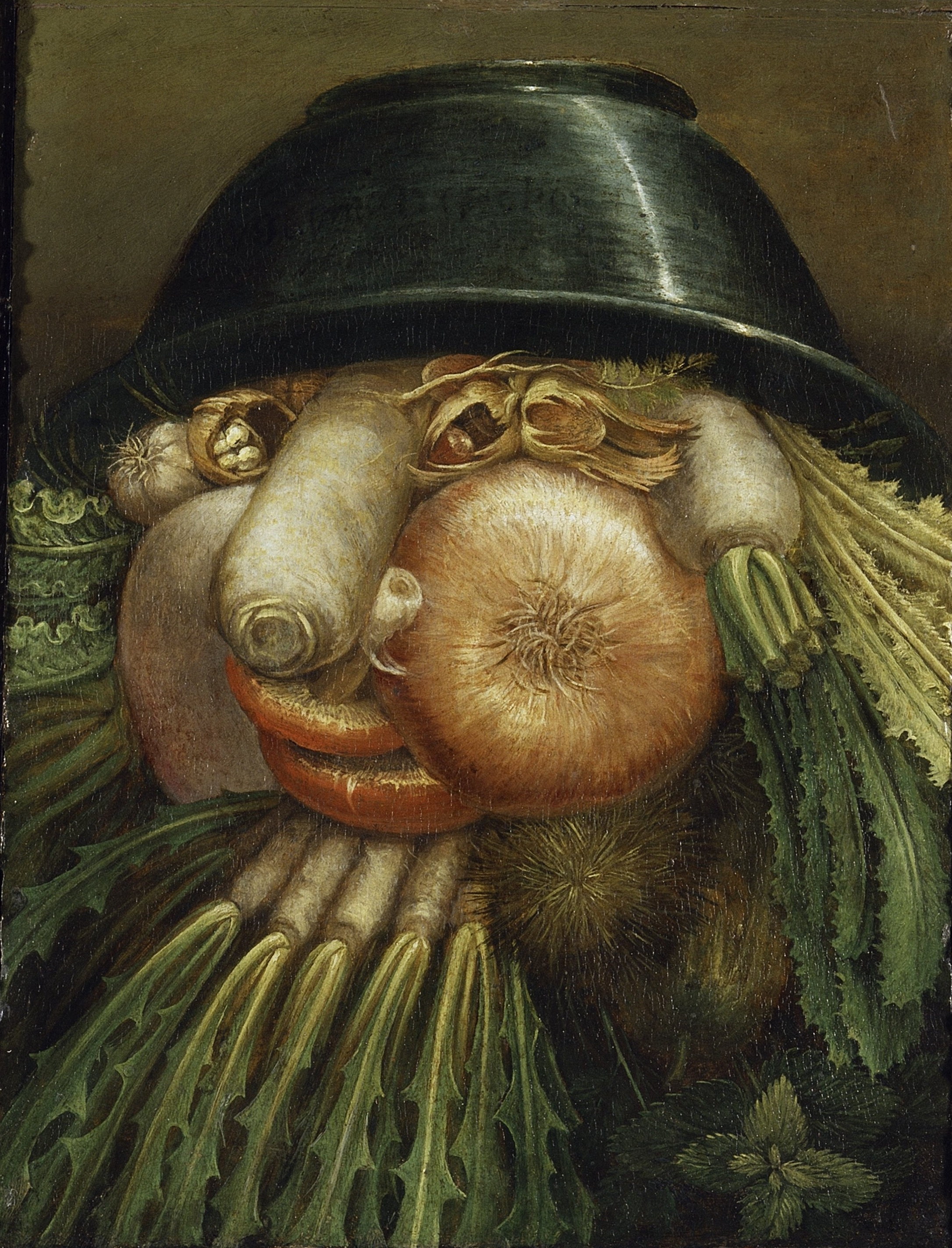 Portrait with Vegetables (The Greengrocer).label QS:Len,"Portrait with Vegetables (The Greengrocer)." label QS:Lde,"Portrait mit Gemüse (Der Gemüsehändler)."